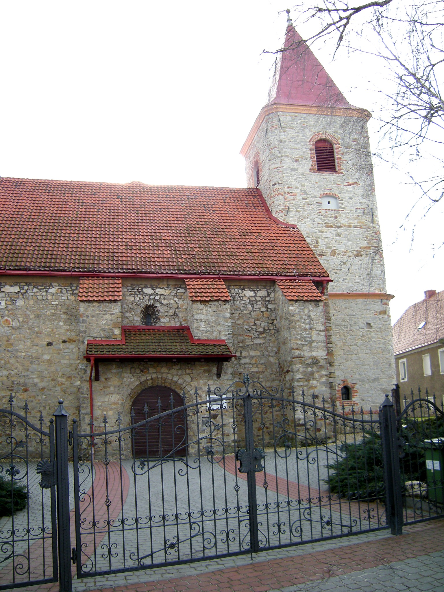 Nowy Świętów - kościół parafialny p.w. Chrystusa Króla, poł. XIII, 1419, XX w (zabytek nr 1115/66 z 5.02.1966)